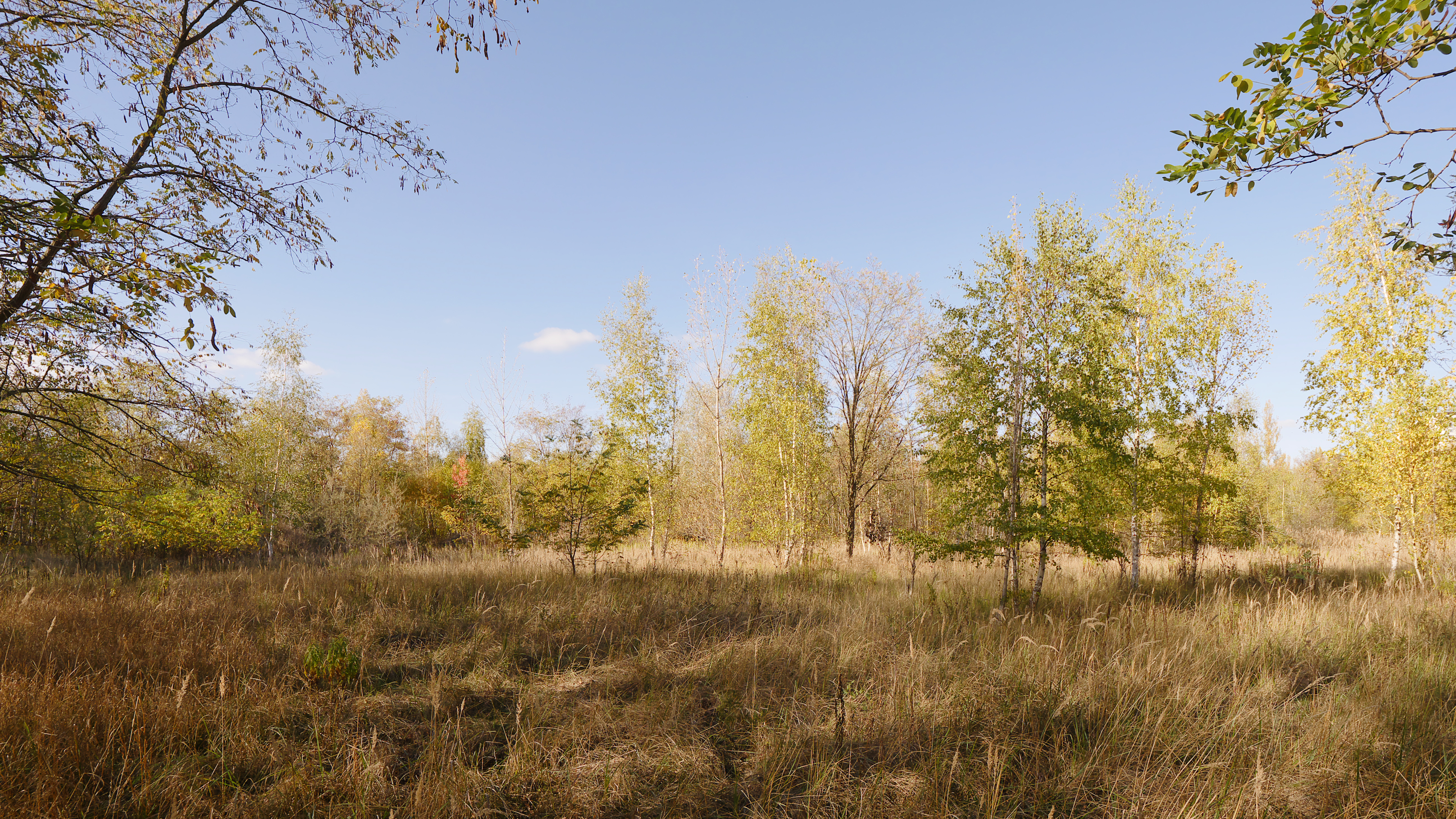 Typische Landschaft in Parks Range in Berlin-Lichterfelde (Herbst 2018)